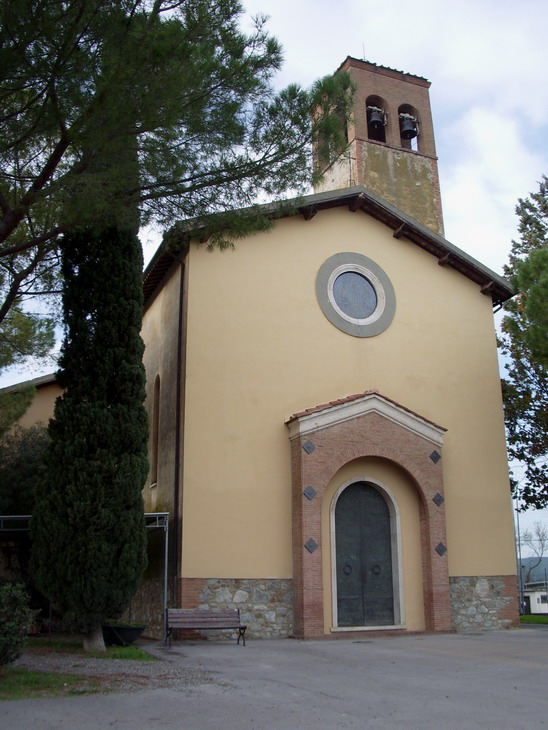 Ernesto Ganelli, chiesa di Santa Maria Ausiliatrice, Marrucheti (Grosseto)